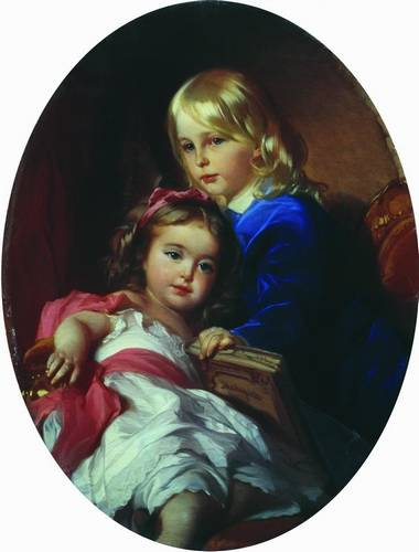 «Дети художника»title QS:P1476,ru:"Дети художника" label QS:Lru,"Дети художника"